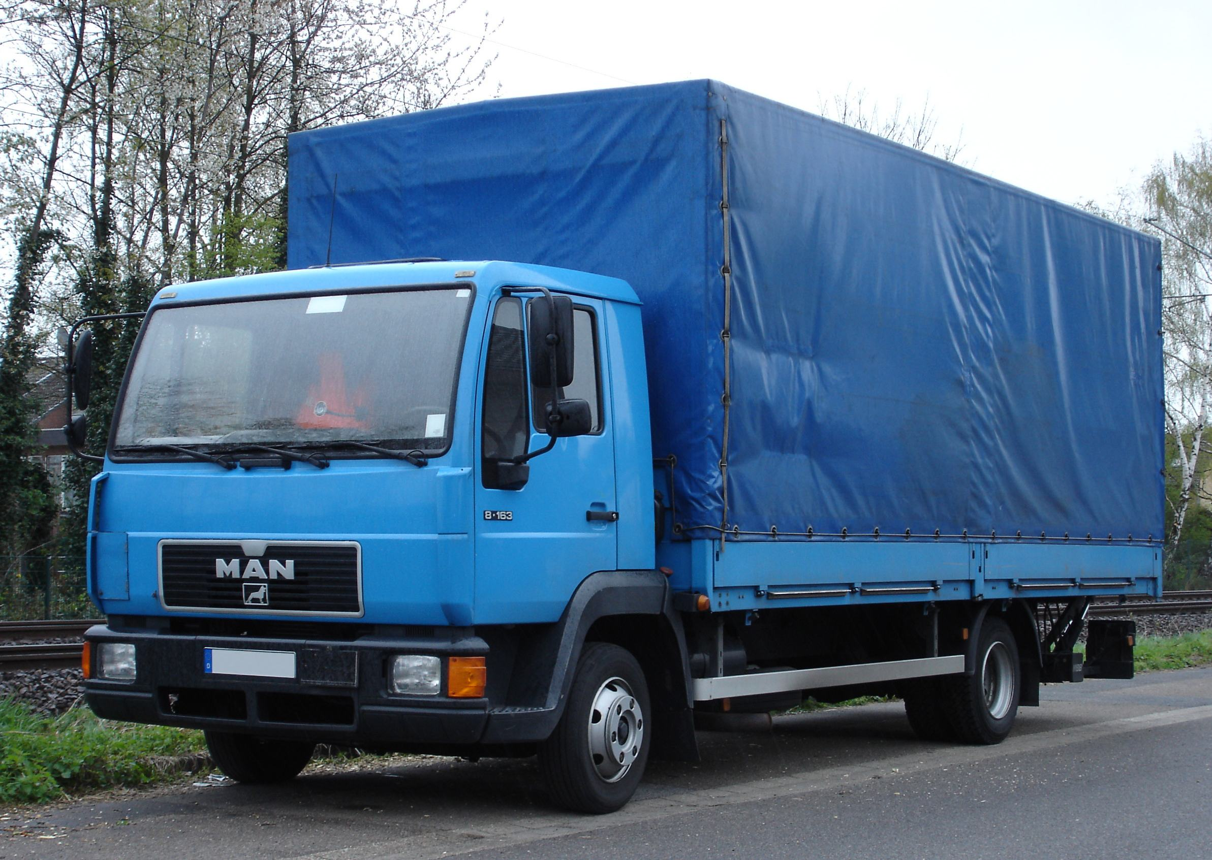 MAN L2000 8-163 Pritschenwagen.